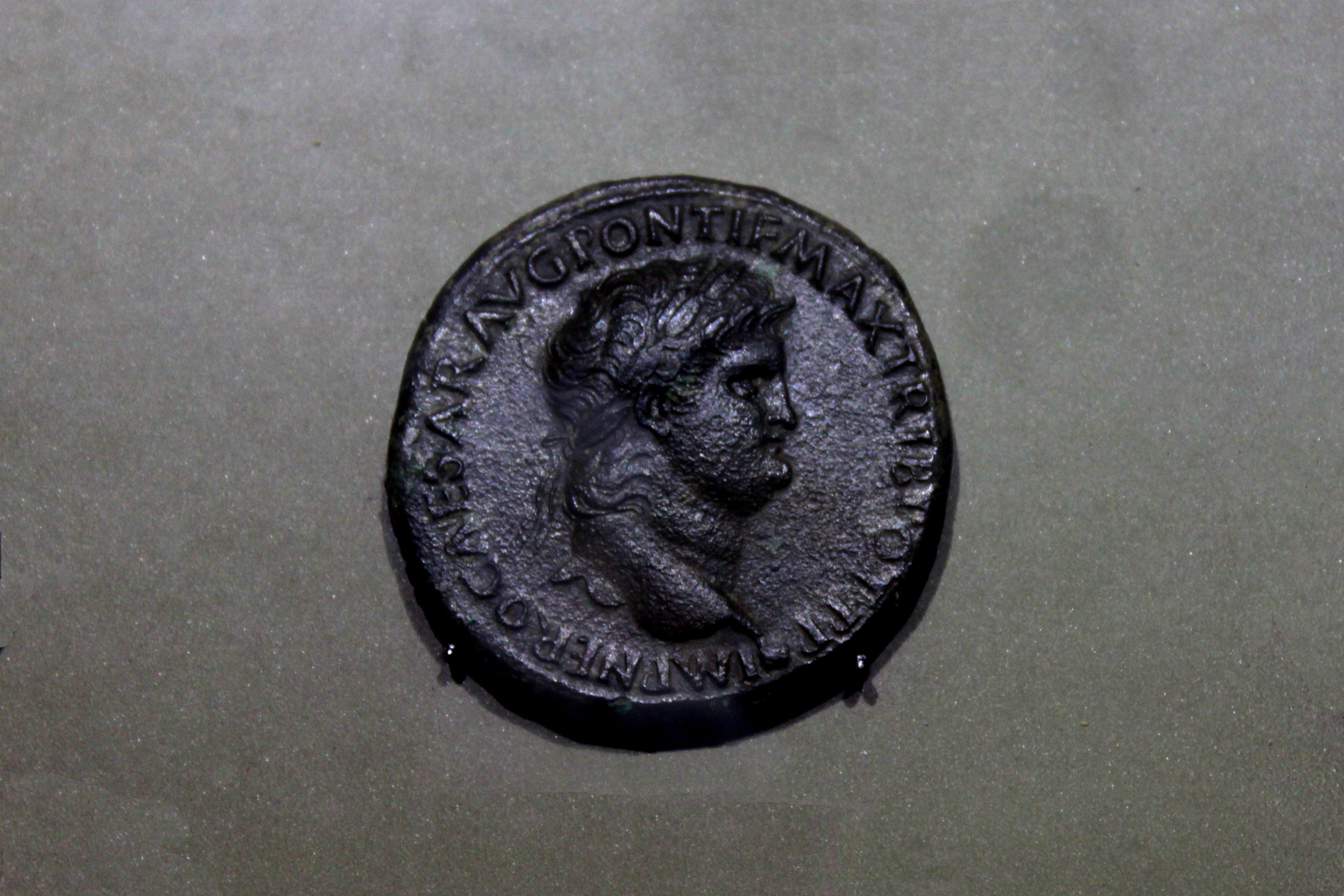 Sestercio de Nerón de los años 64 al 66. Depositada en el Museo de Prehistoria de Valencia, Comunidad valenciana, España.